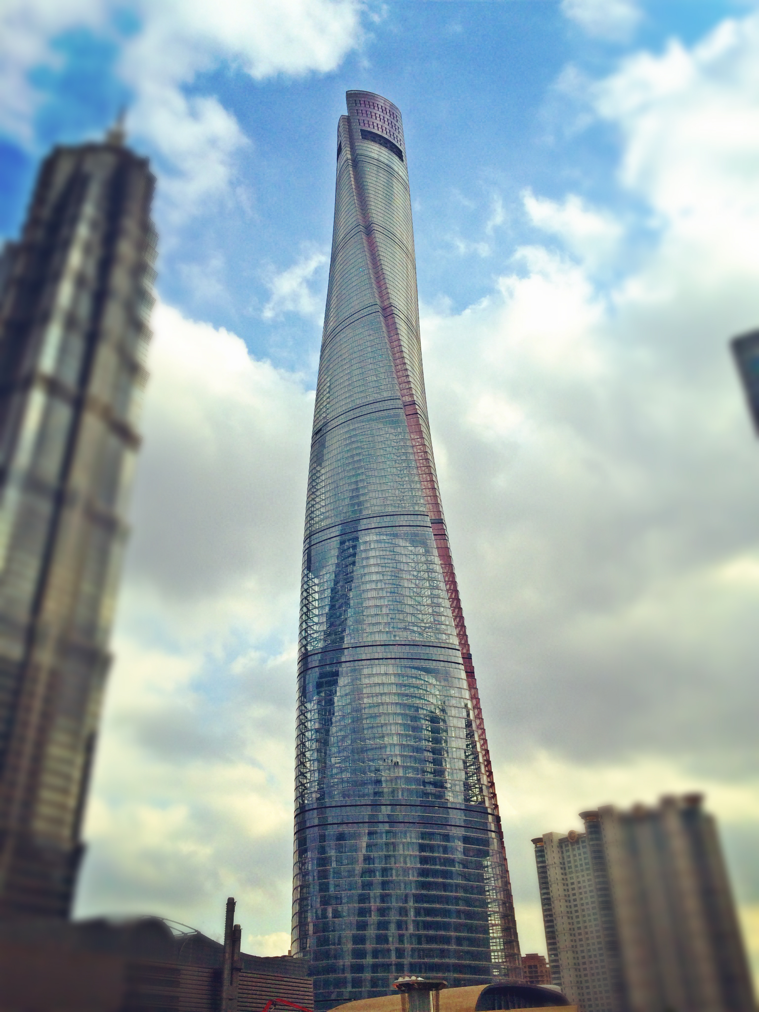 中文（中国大陆）: 上海中心 2014.12.26